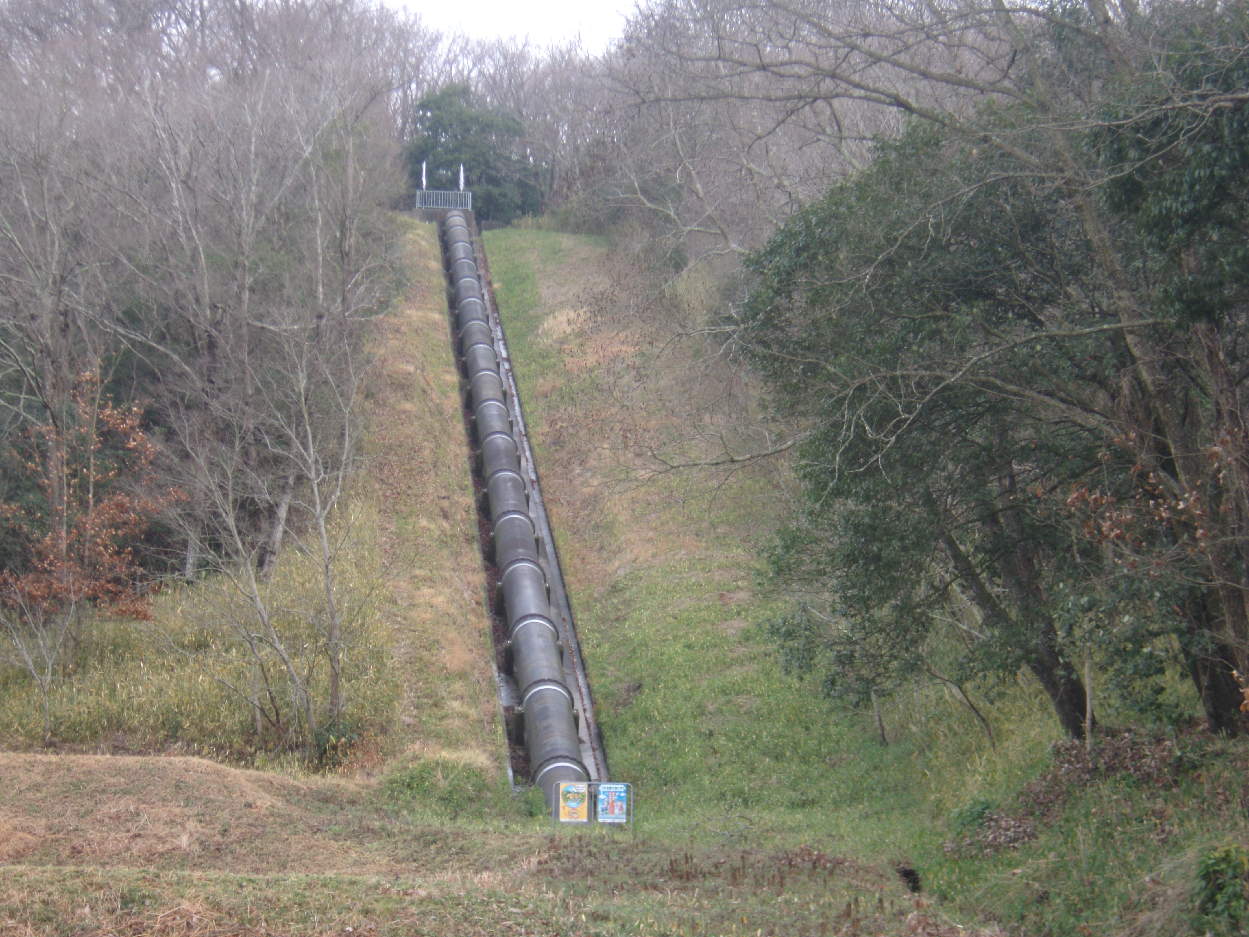 三木市の御坂サイフォン橋へ至る淡河疎水の導水管（御坂神社裏手の愛宕山）